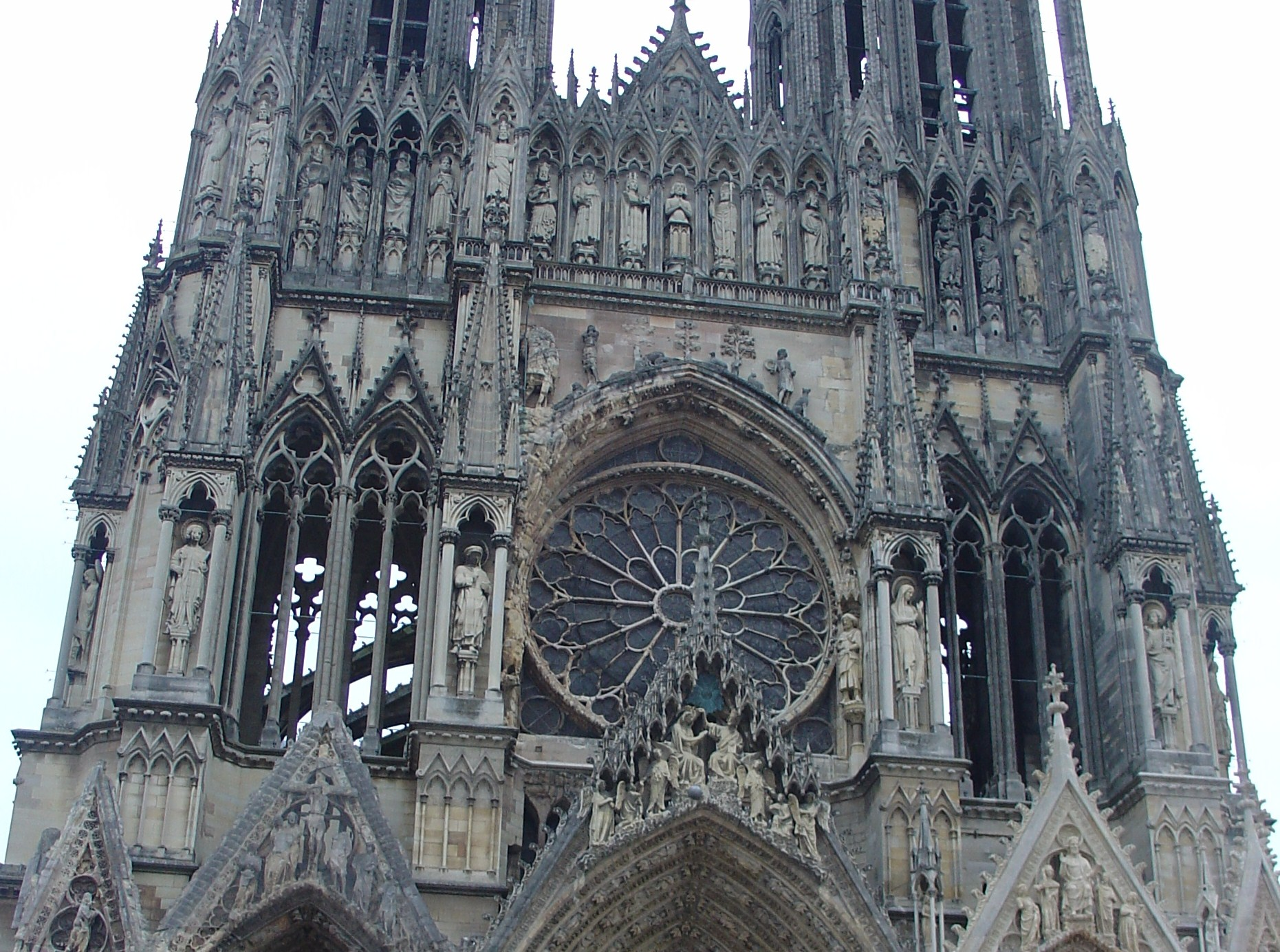 cathédrale de Reims vue au dessus de la rosace, galerie des rois